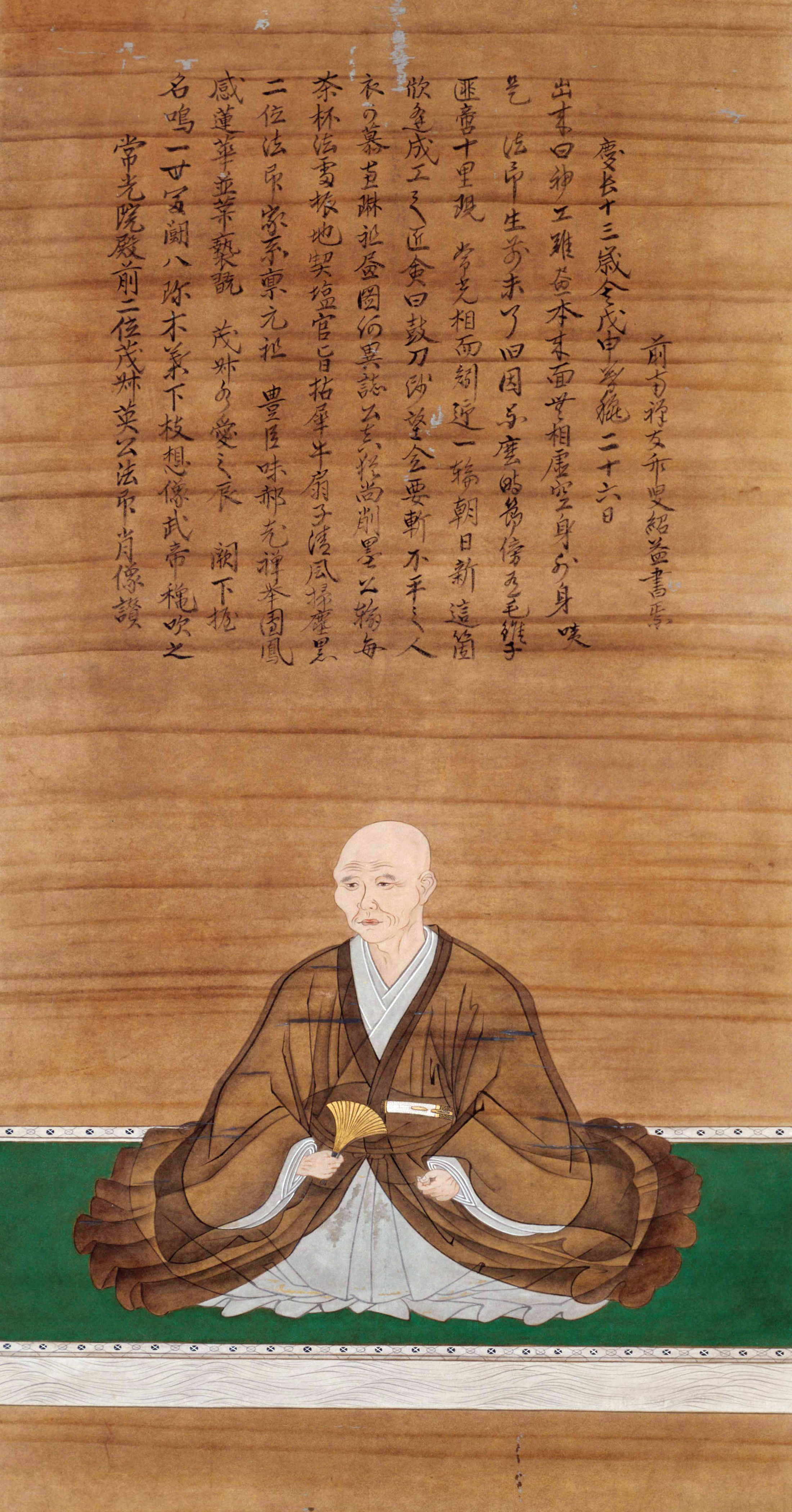 常光院殿前二位茂叔英公法印肖像讃 名鳴一世富闘八珎木葉下枝想像武帝穐吹之 感蓮華並□褻翫 茂叔水愛之辰 闕下握 二位法印家系稟元祖 豊臣味郝老禅挙團鳳 茶杯法雷振地契塩官旨拈犀牛扇子清風掃塵黒 衣可慕恵琳祖畫圖何異誌公真猶尚削墨公輸毎 □（欣カ）逢成工之匠命曰鼓刀師望□要斬不平之人 匪啻十里現 常光相而矧迎一輪朝日新這箇 是 法印生前未了旧因□（焉カ）麼□（時カ）節傍有毛□子 出来曰神工難畫本来面無相虚空身外身咦 慶長十三歳舎戊申暮穐二十六日 前南禅友竹叟紹益書焉